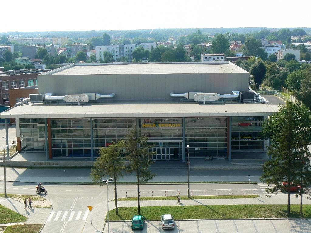 Hala Energia (Bełchatów) - zdjęcie skorygowane o szumy